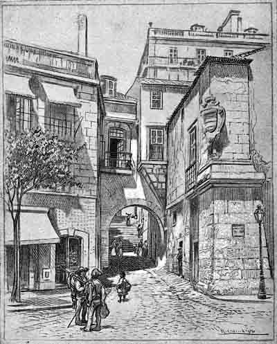 Esta imagem (em domínio público por morte do autor há mais de 75 anos) faz parte de um conjunto de 100 aguarelas e gravuras criadas em 1910-1920 e publicadas no livro Lisboa Velha (Afonso Lopes Vieira (prefácio). Anuário Comercial: Lisboa, 1925).